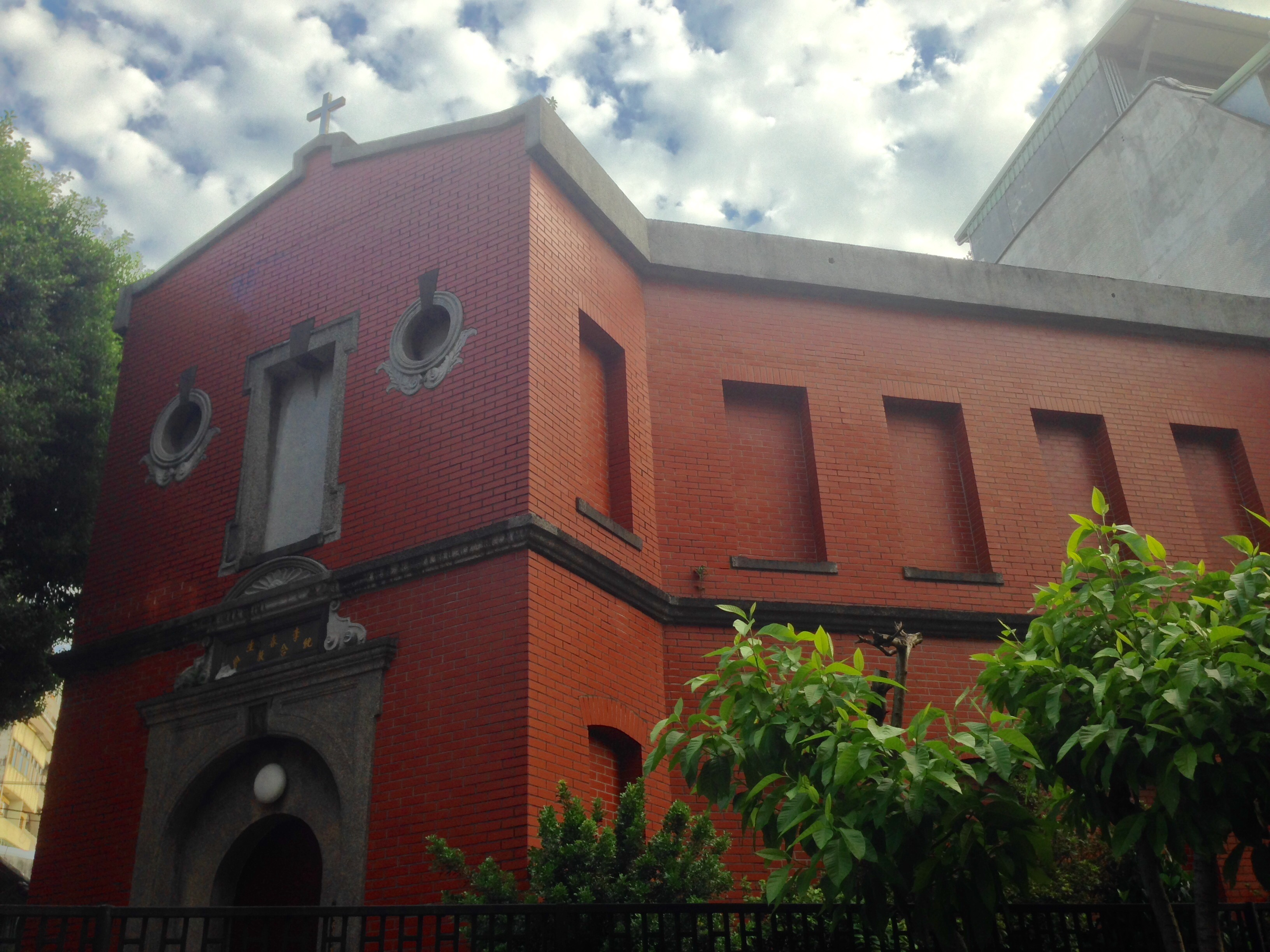 台灣基督長老教會李春生紀念教會。